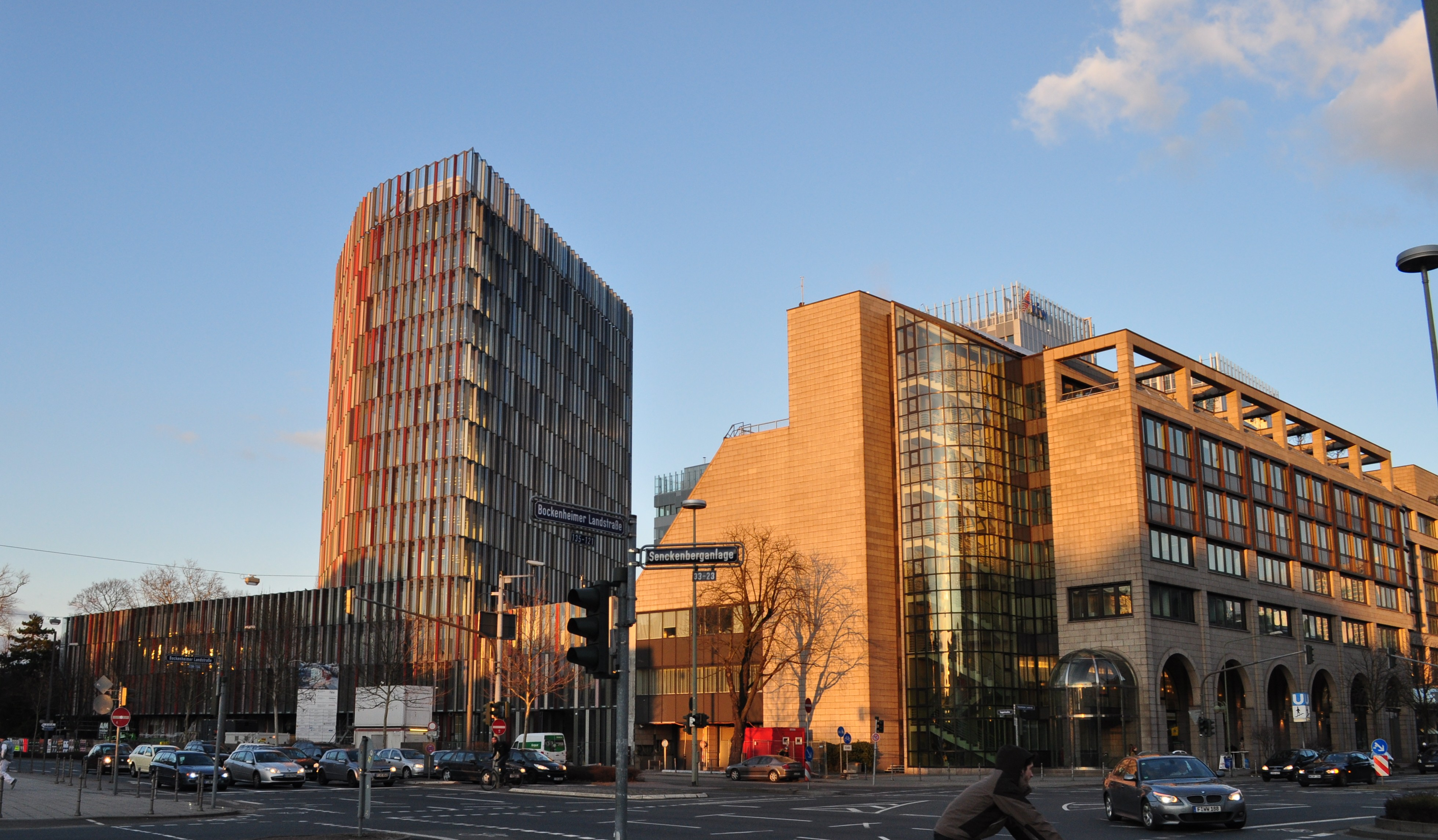 Westarkade in Frankfurt am Main, die Zentrale der KfW